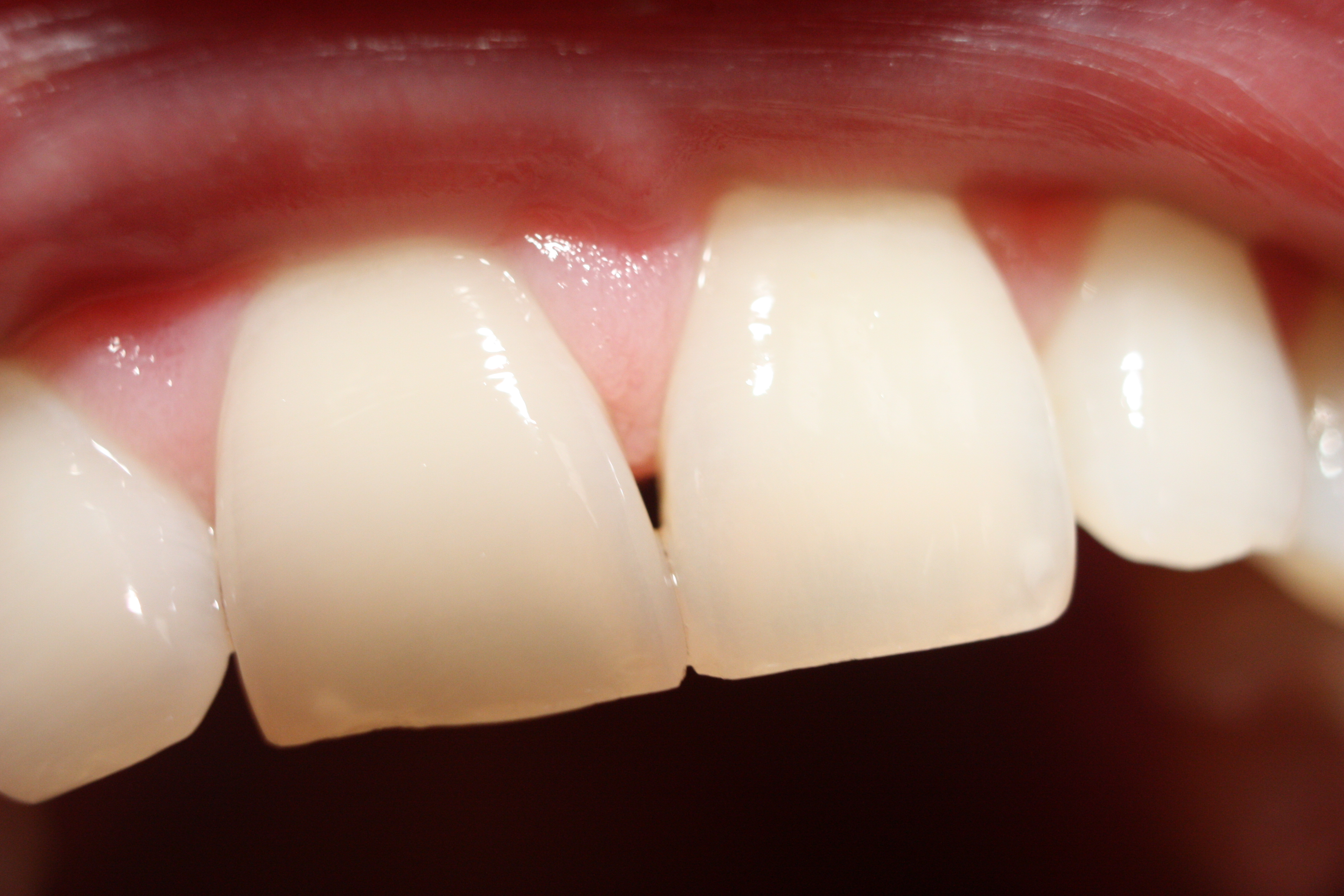 Oberkiefer Frontzähne (obere mittlere Schneidezähne, Zähne 11 und 21)